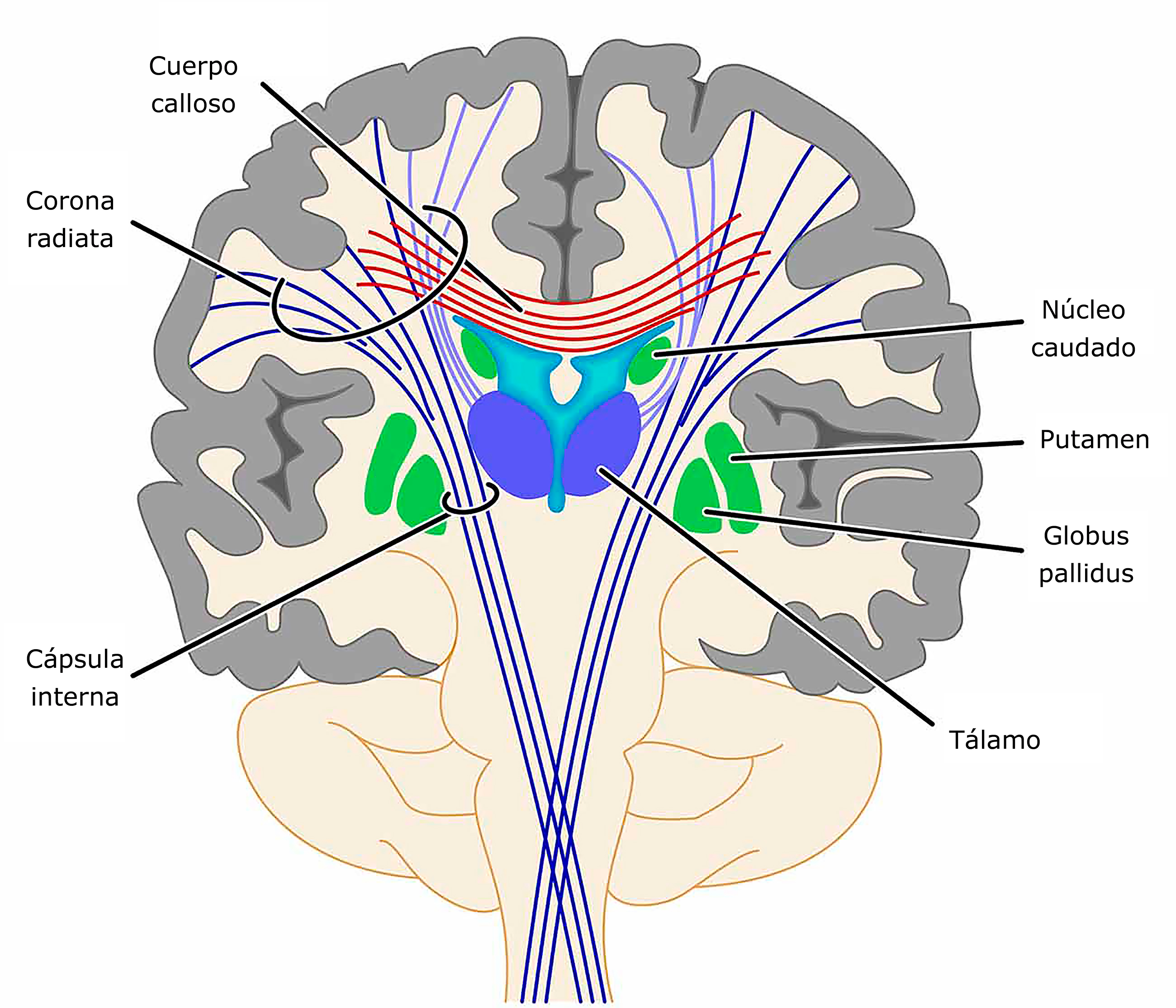 Corte del cerebro en el que aprecian diversas estructuras, incluyendo los ganglios basales, el cuerpo calloso y la cápsula interna.